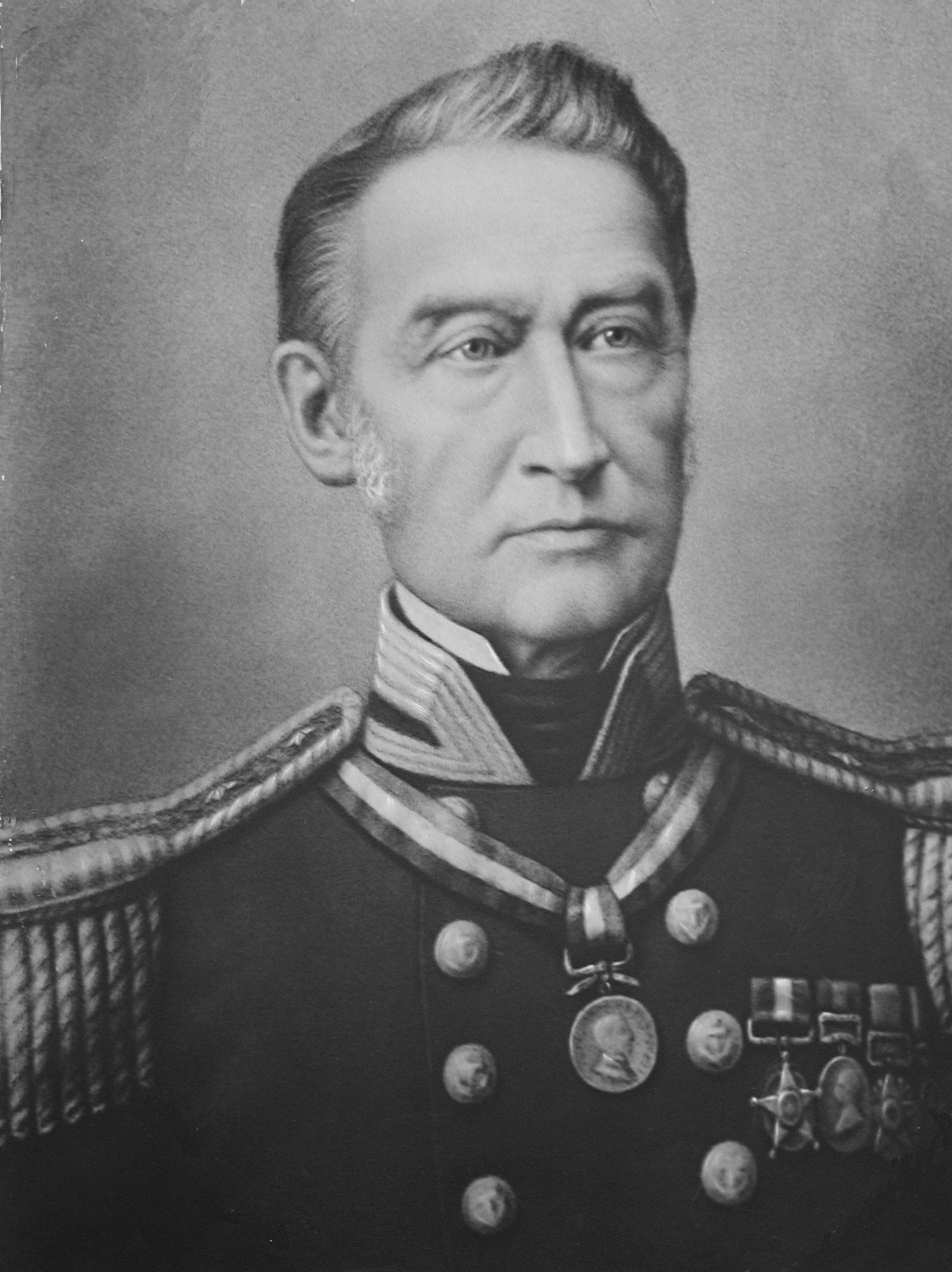 R. Simpson. Fundador de la Hidrografía en Chile